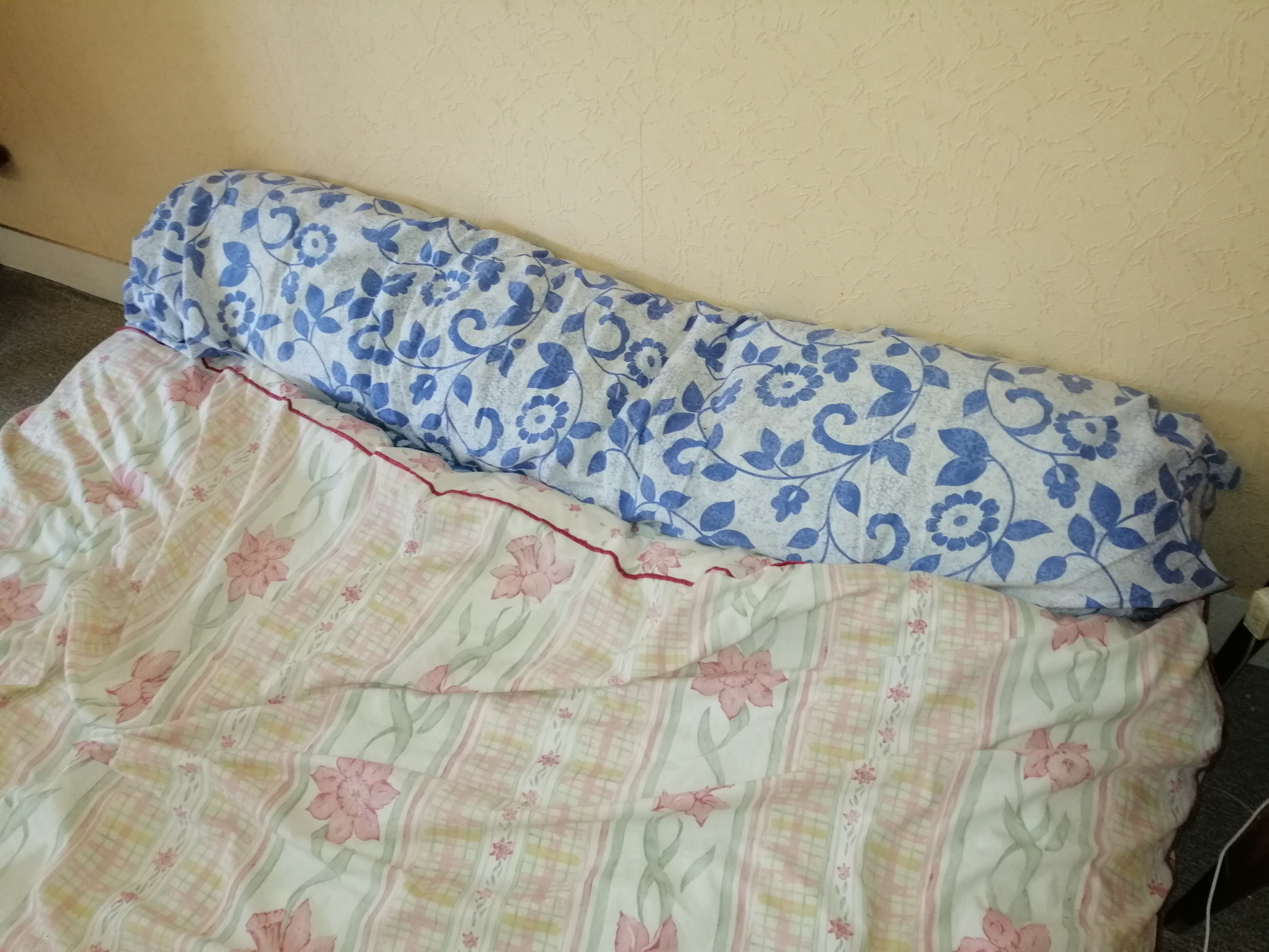 Traversin motifs fleuris